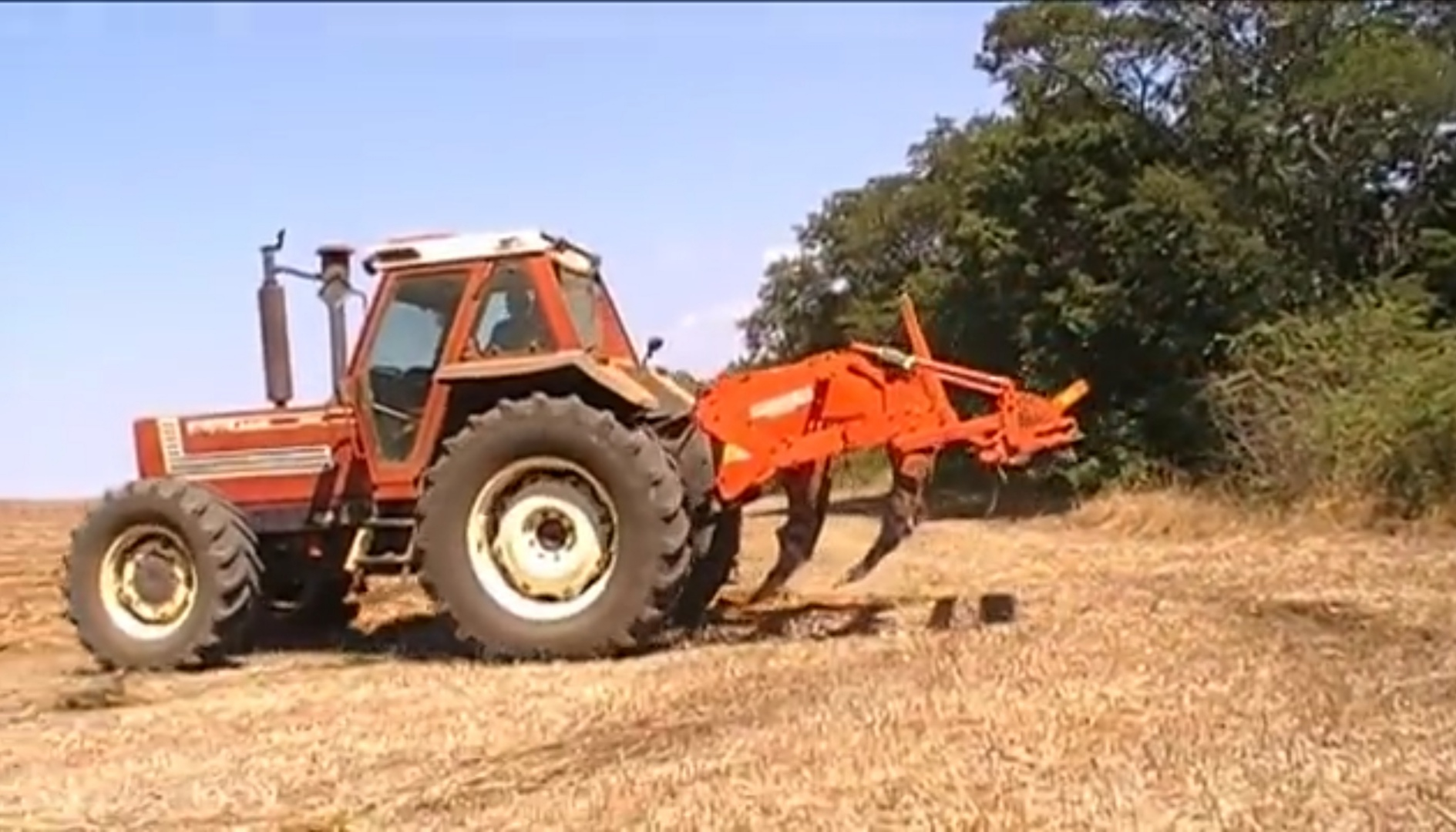 Lavori agricoli